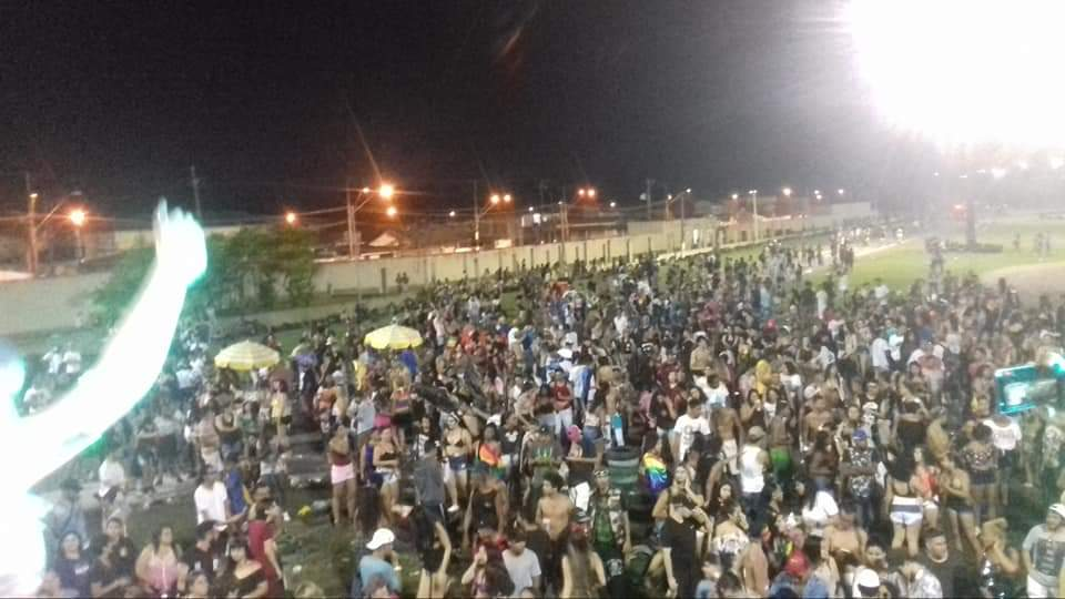 Final da 1ª Parada do Orgulho LGBT de Praia Grande 2018 às 22h com a Banda Banana Split